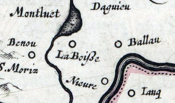 Carte Gallica de la Bresse ; centrée sur Niévroz, Balan, La Boisse et l'actuel canton de Montluel.